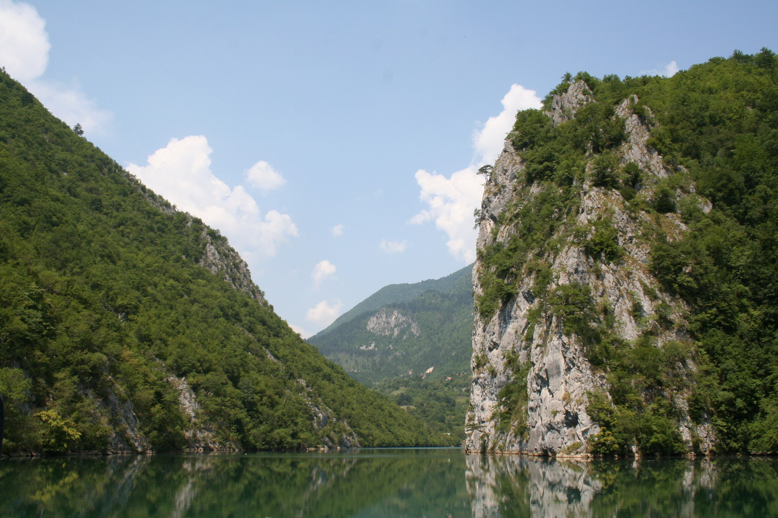 Drina river